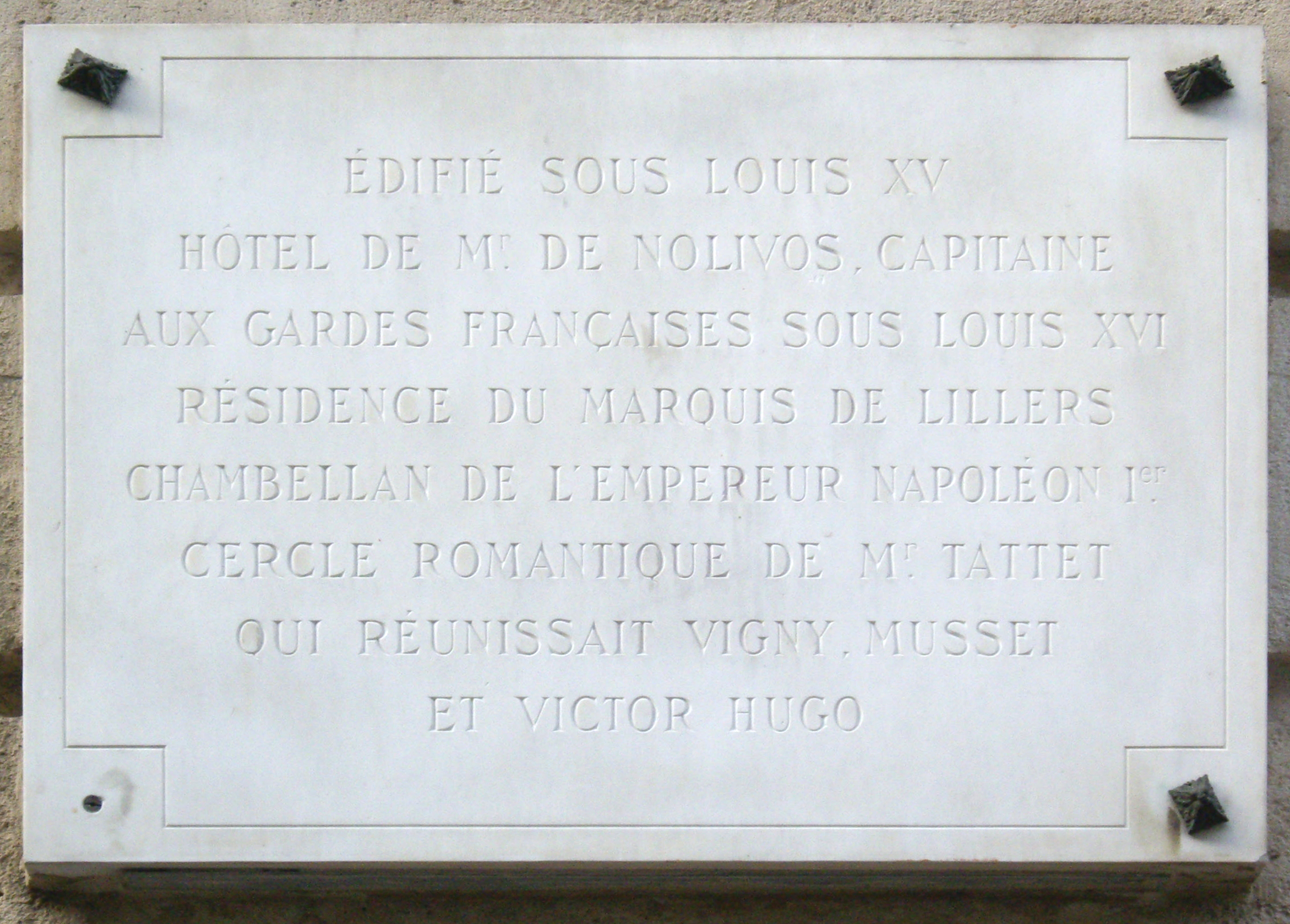 Plaque commémorative, 10 rue de la Grange-Batelière, Paris 9e.« Édifié sous Louis XV.Hôtel de Mr. de Nolivos, capitaine aux gardes françaises sous Louis XVI.Résidence du marquis de Lillers, chambellan de l'empereur Napoléon Ier.Cercle romantique de Mr. Tattet qui réunissait Vigny, Musset et Victor Hugo. »NotesPierre Gédéon de Nolivos (1714-?).Claude Louis Michel Le Duc, marquis de Lillers (1761-?).Alfred Tattet (1809-1856), ami de Alfred de Vigny, Alfred de Musset, Victor Hugo.